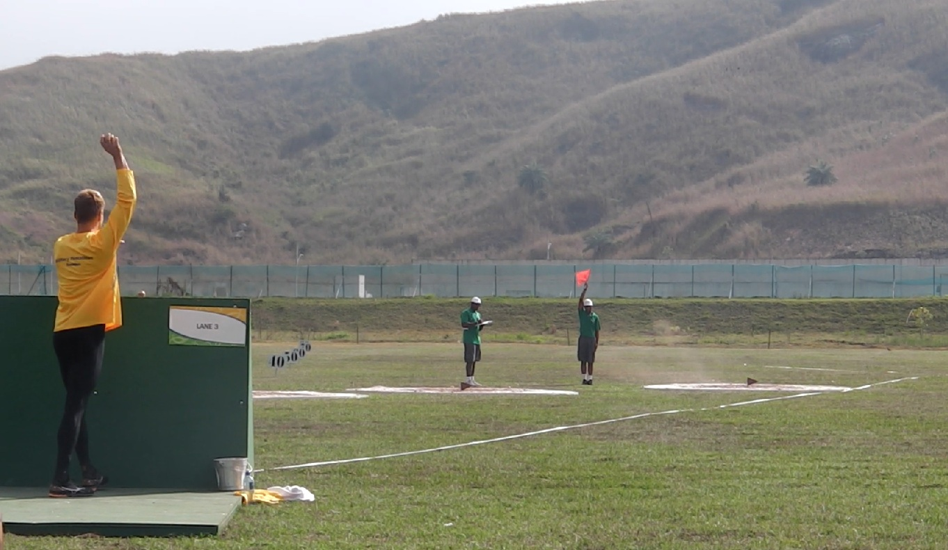 Handgranatkastningsmomentet i militär femkamp